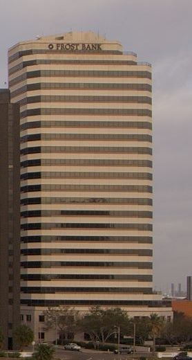 Frost Bank Plaza cropped